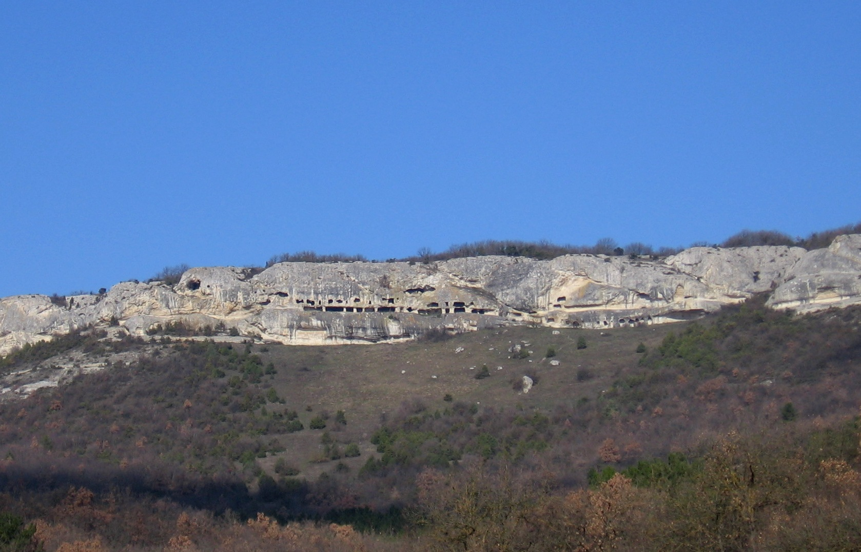 Пещерный монастырь Челтер-Мармара, Крым